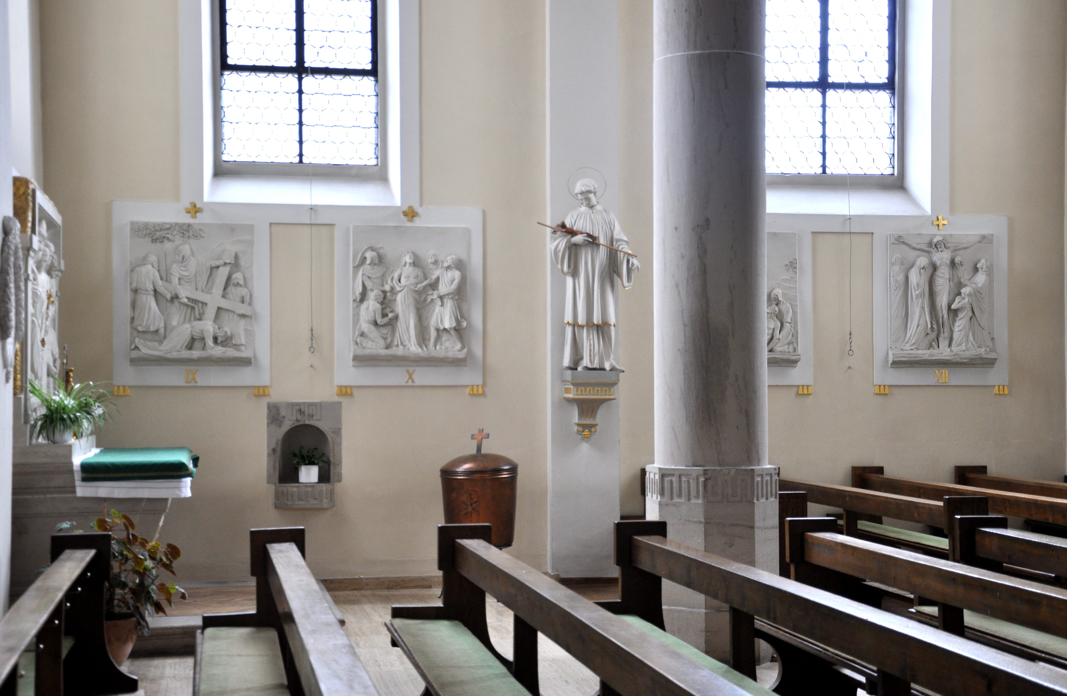 Haslach im Kinzigtal, katholische Pfarrkirche St. Arbogast, Kreuzwegstationen von August Schädler (1862–1925), 1907